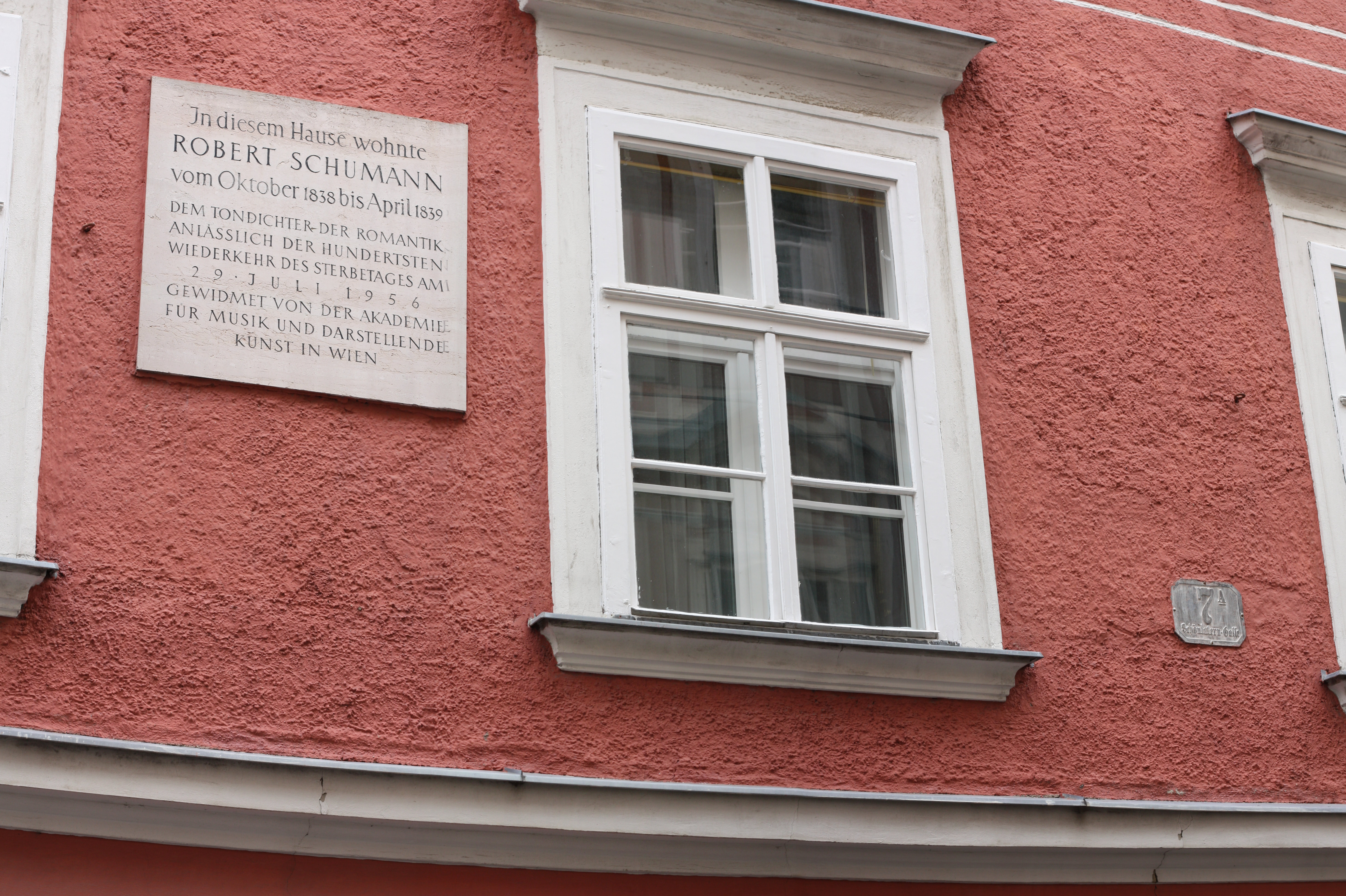 Zentrum, Vienna, Wien